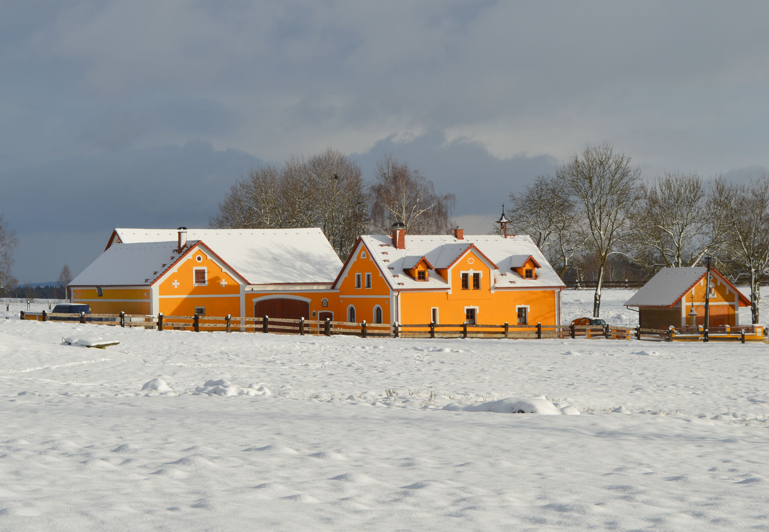 Usedlost v Zeleném Háji dříve Hagengrun